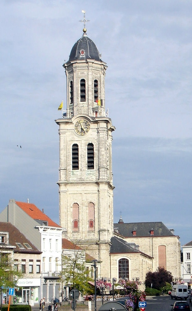 Sint-Laurentiuskerk (Lokeren)